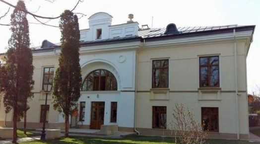 Casa Milescu, azi tipografia U. M.F.